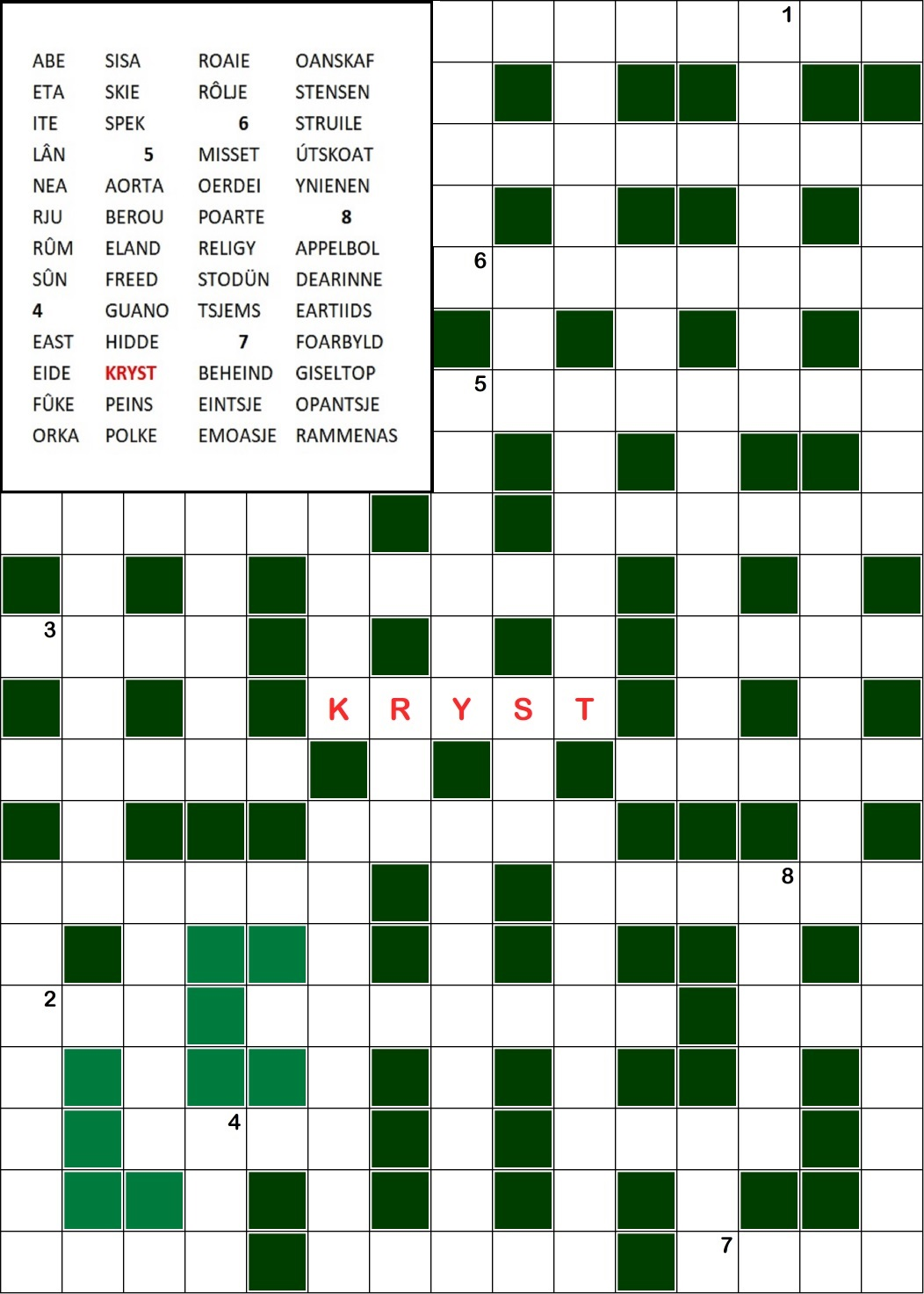 Pas de woorden uit de linker bovenhoek in het diagram. Bij juist invullen vormen de letters in de genummerde vakjes het oplossingswoord.